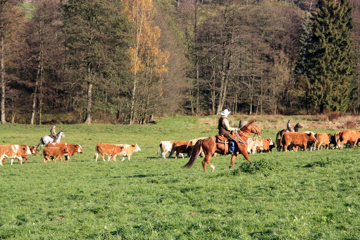 Treiben einer Kuherde mit einem echten Cowboy aus Montana (USA